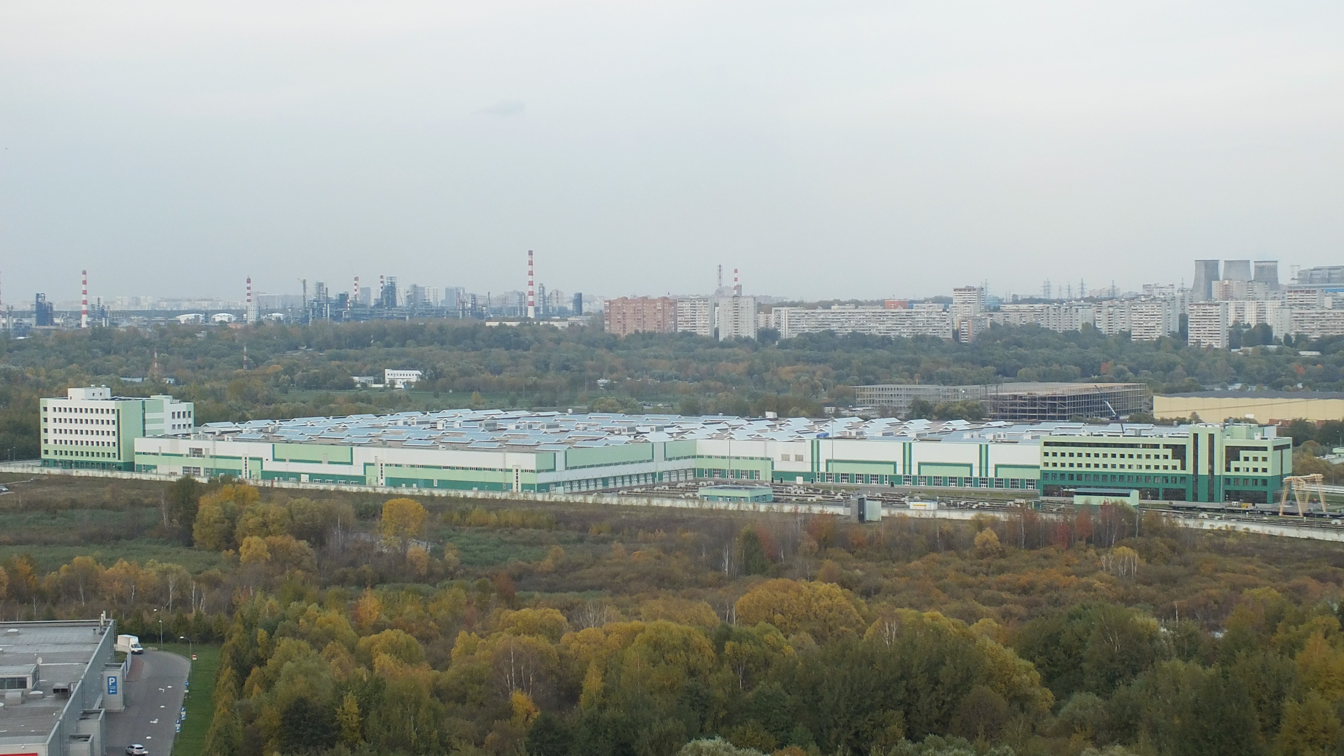 Электродепо «Братеево», съёмка из одного из домов в районе Зябликово. 7 октября 2018 года/ Слегка улучшена цветность фото